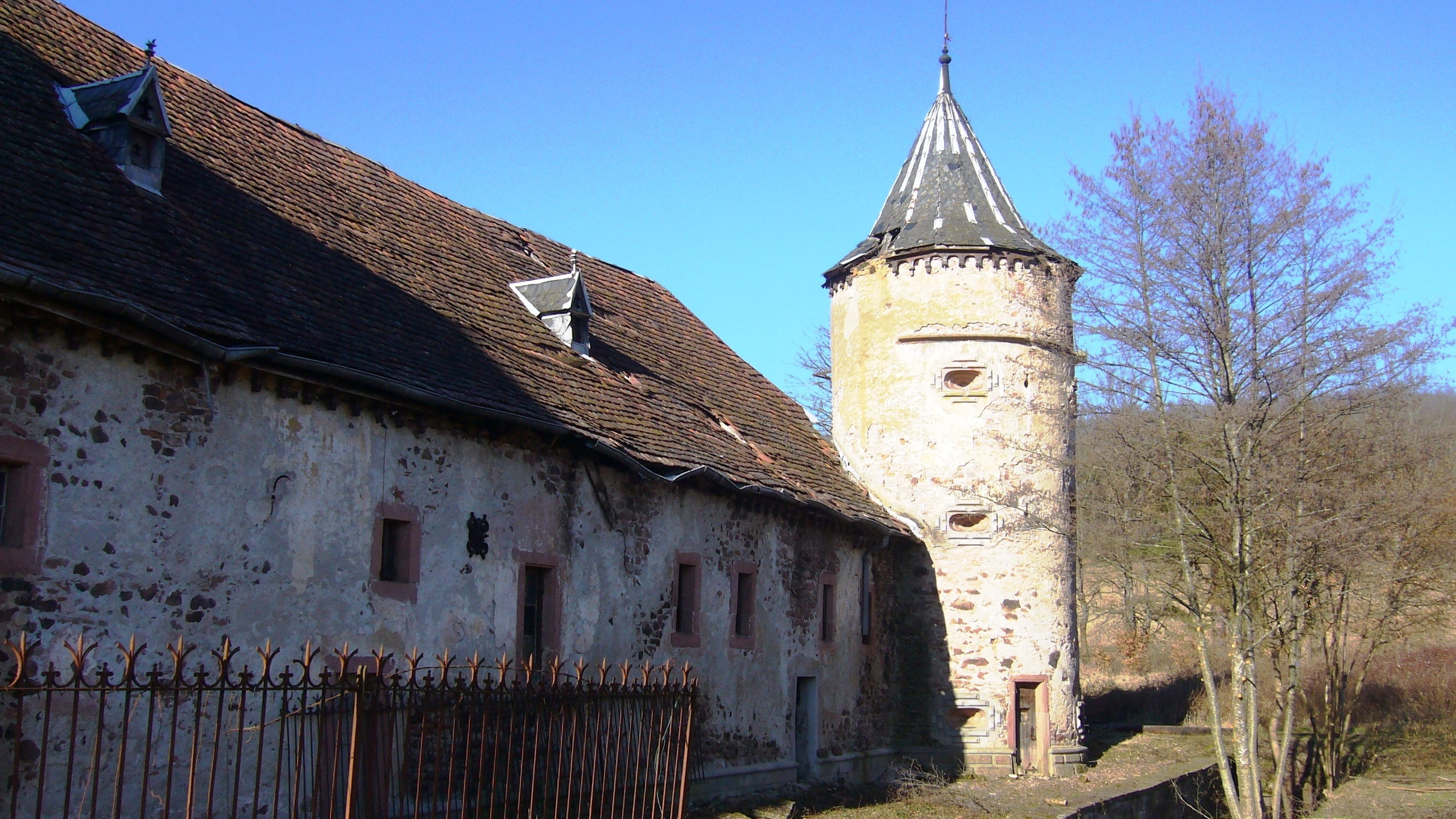 Thanvillé 041.JPG